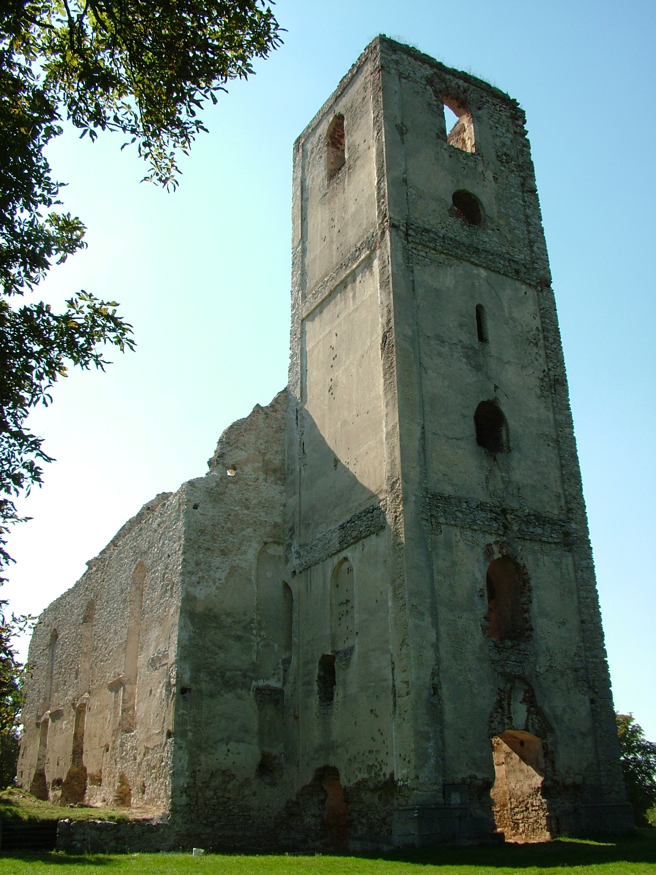 Katarínka. Zrúcanina kostola a kláštora sv. Kataríny. Pohľad na vežu. This medium shows the protected monument with the number 207-958/2 in the Slovak Republic.